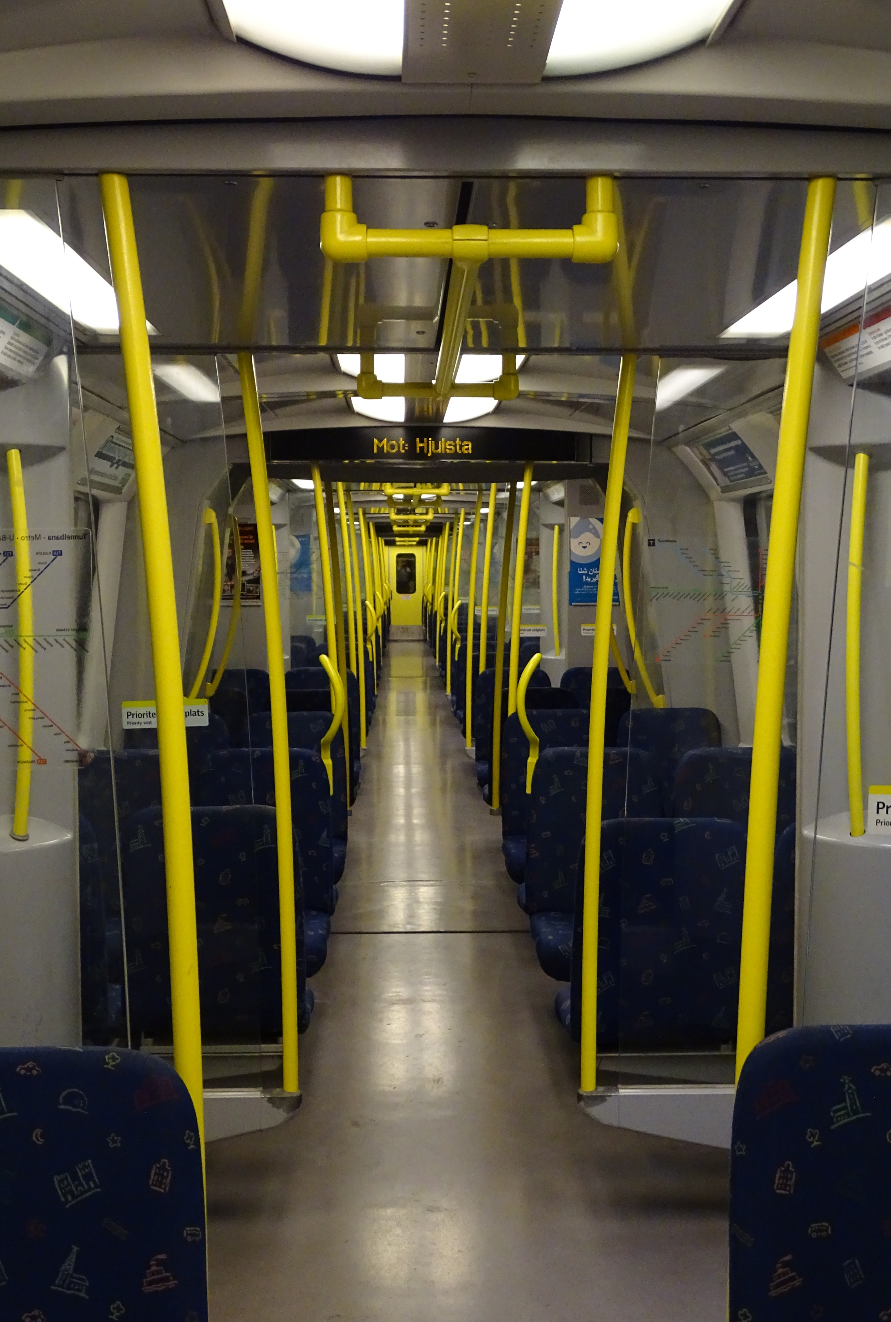 Het interieur van een Bombardier C20 van de Metro van StockholmStockholmse metro.